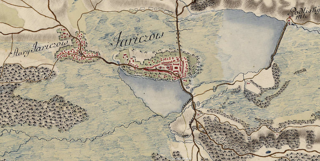 xviii